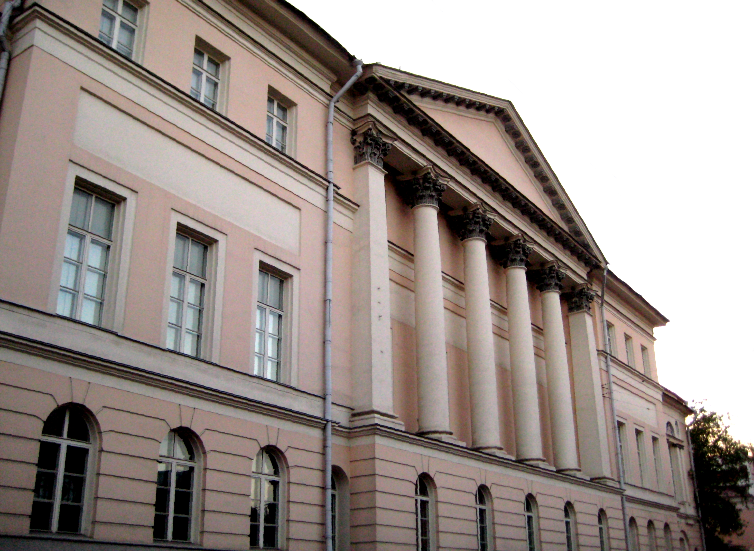 ММСИ